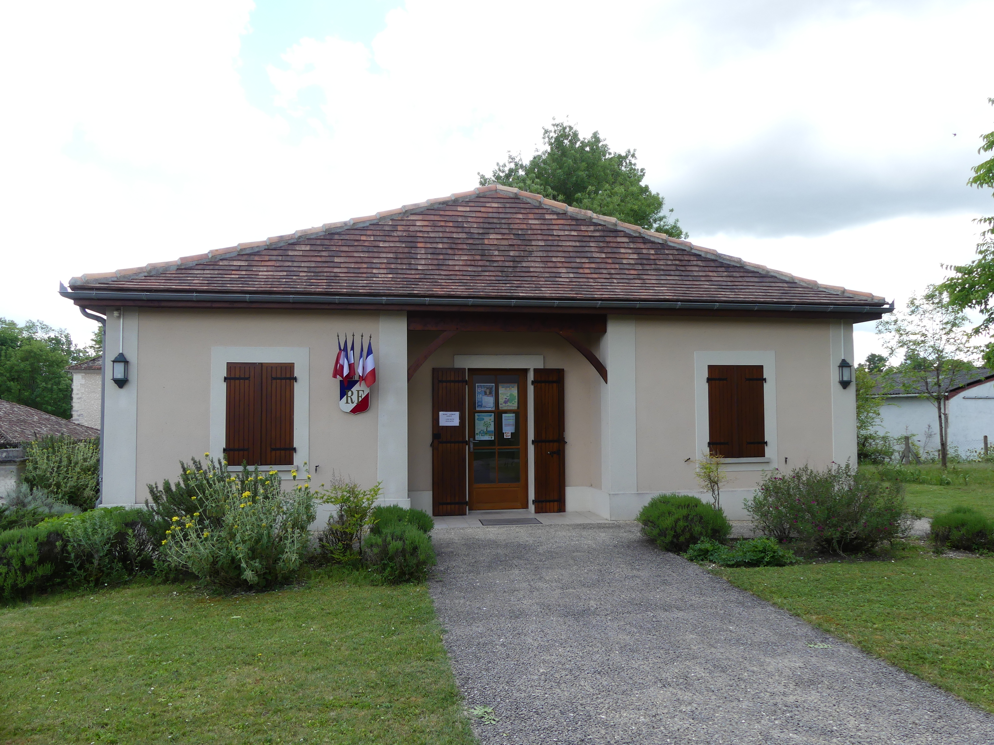 La mairie de La Jemaye, Dordogne, France.